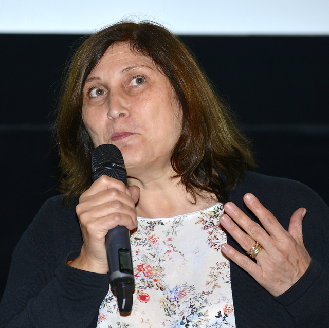 Suzanne Khardalian under presentation av den Svenska filmhösten 2014 på Bio Victor i Filmhuset i Stockholm den 18 augusti 2014. Arrangörer: Svenska Filminstitutet och Film&TV-Producenterna.